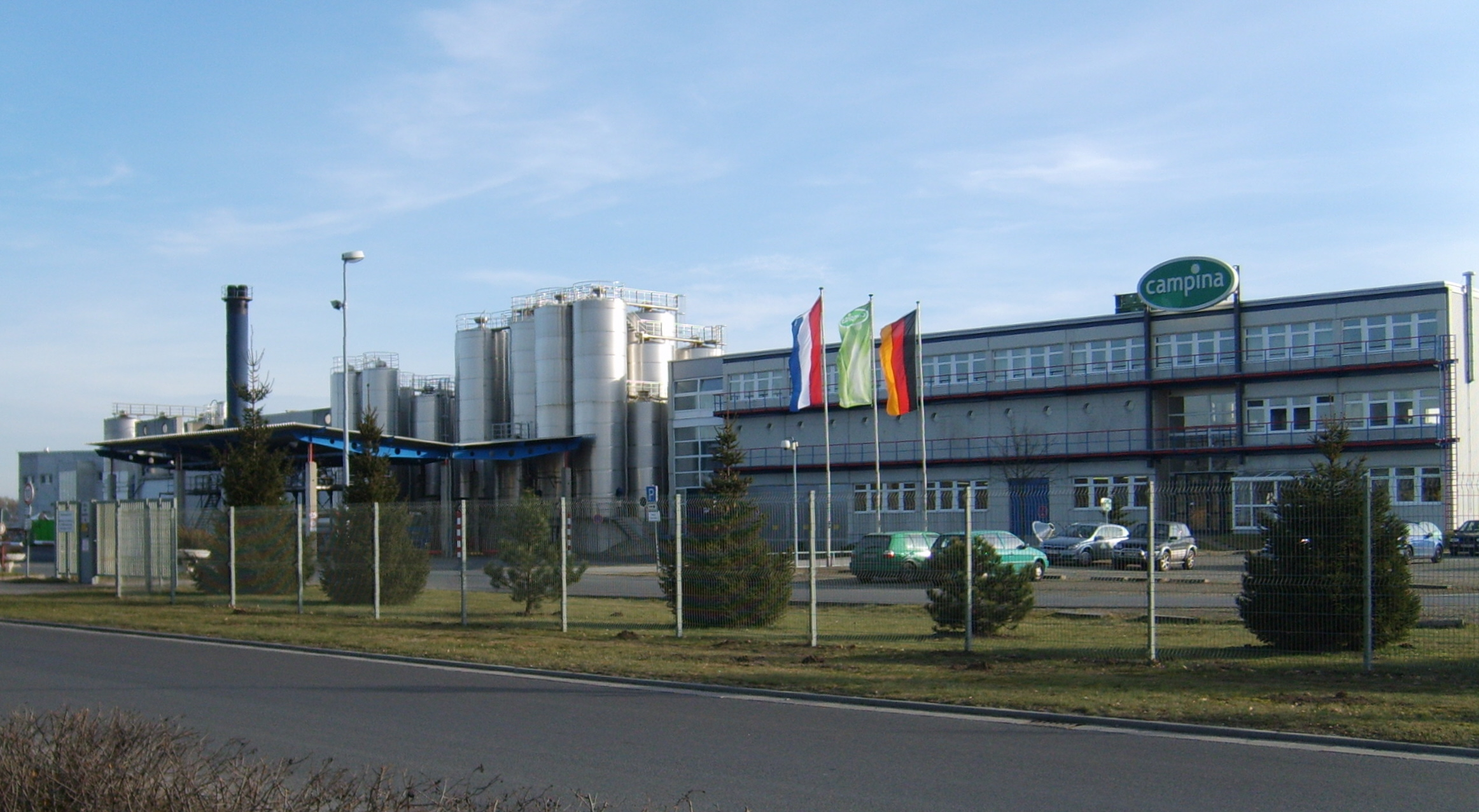 Das Campina-Milchwerk in Elsterwerda